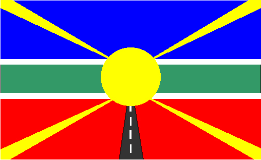 Bandeira_Ribeirão_Cascalheira_MT.jpg